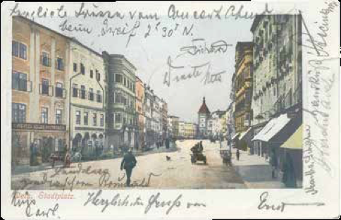 Das Haus am Stadtplatz 13, Ende des 19. Jahrhunderts in Wels